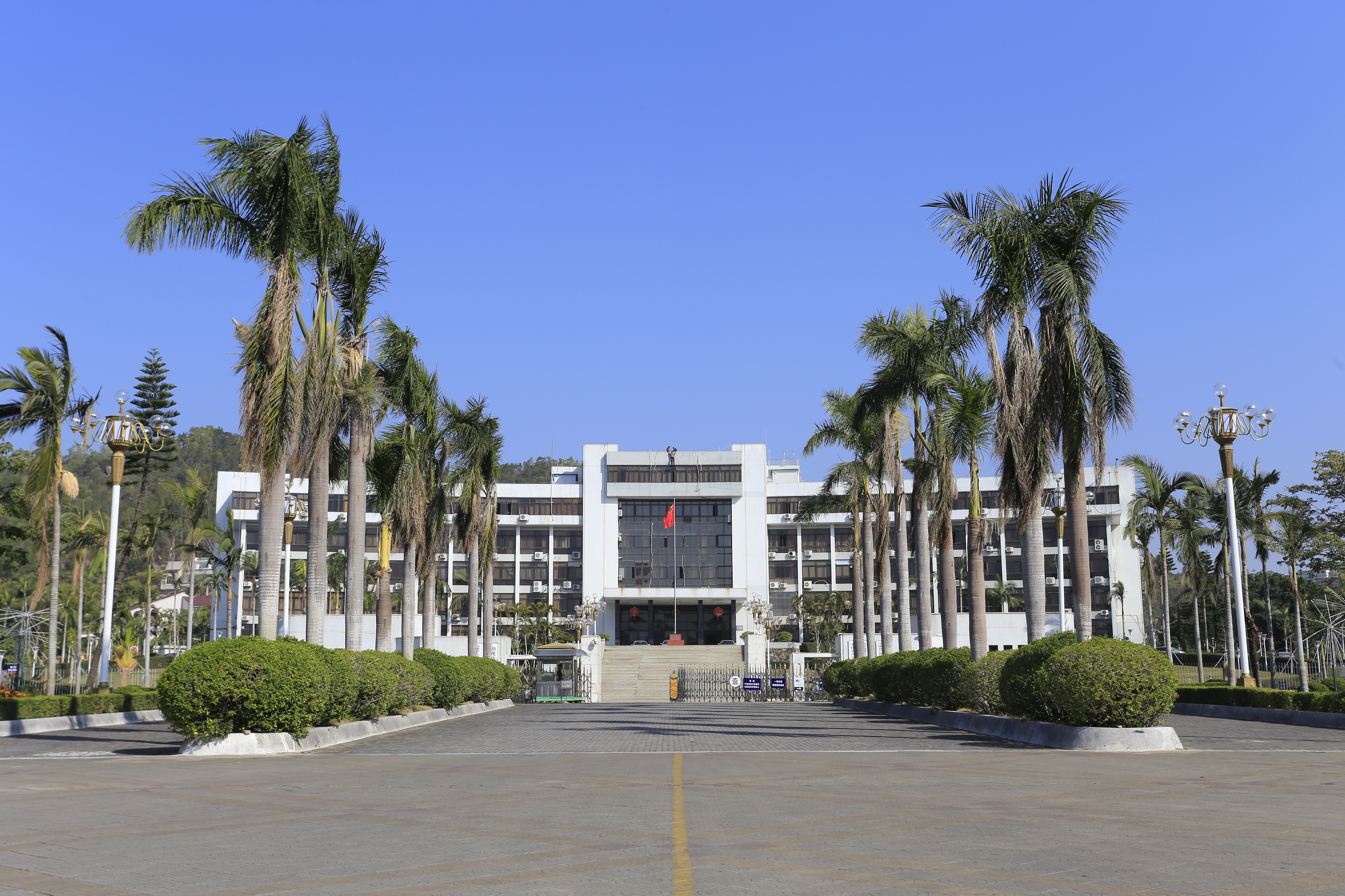 汕尾市人民政府